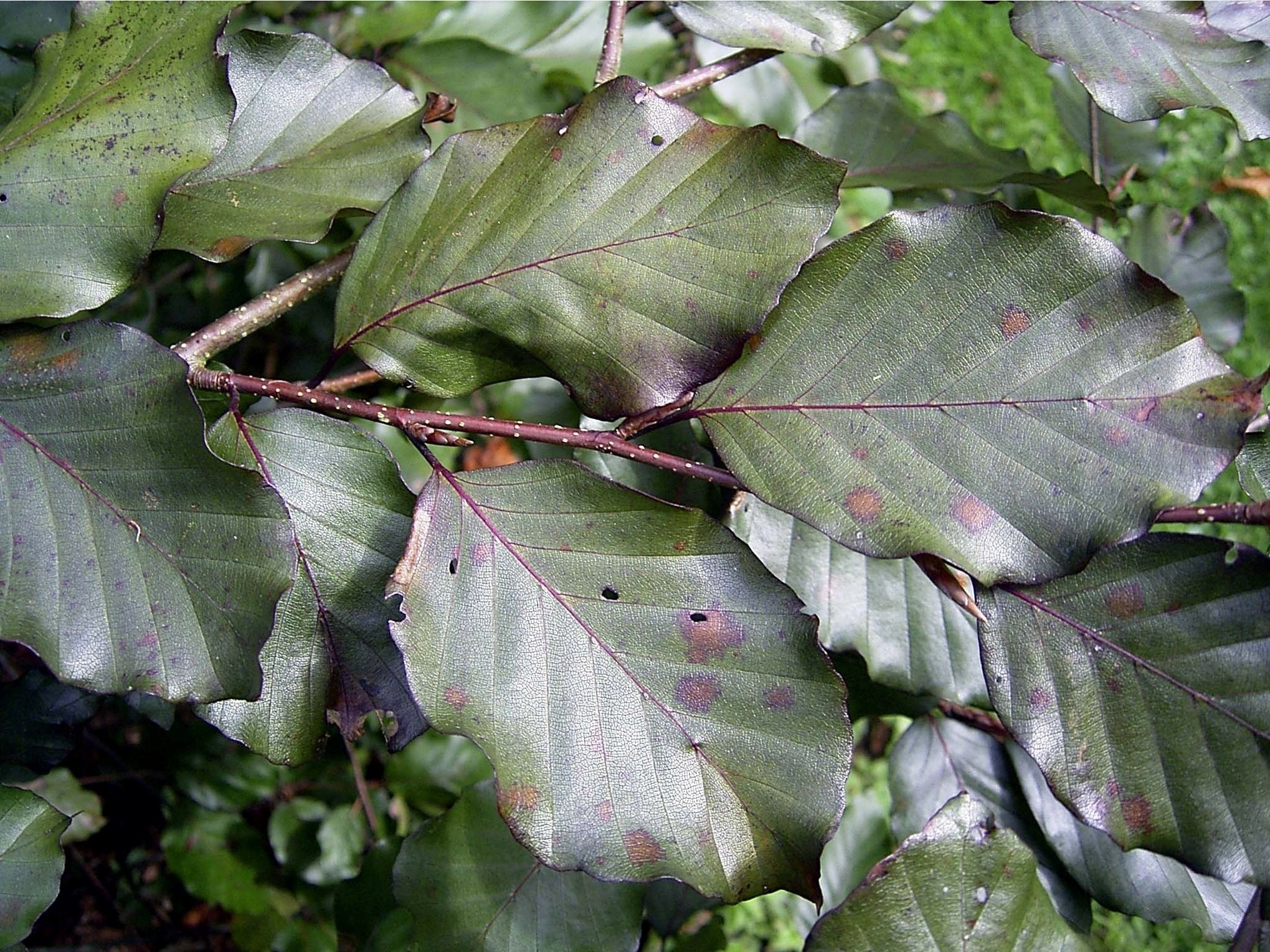 Fagus sylvatica 'Purpurea' in Bad Nenndorf, Deutschland